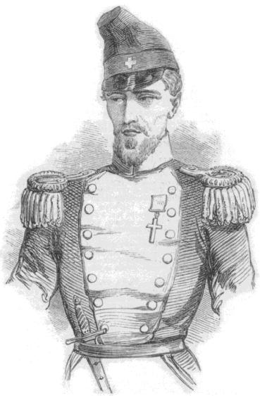 Miguel José Cambiaso Tapia (Santiago, 1823 - Valparaíso, 4 de abril de 1852) fue un militar y político chileno. Fue mandado a Punta Arenas en castigo de actos de indisciplina cometidos en Ancud. Allí también llevó una conducta irregular, por lo que se le arrestó. Mientras cumplía este arresto se escapó y organizó el motín. Elegido Senador por Valdivia en 1846, ejerció el cargo hasta su detención en 1851.